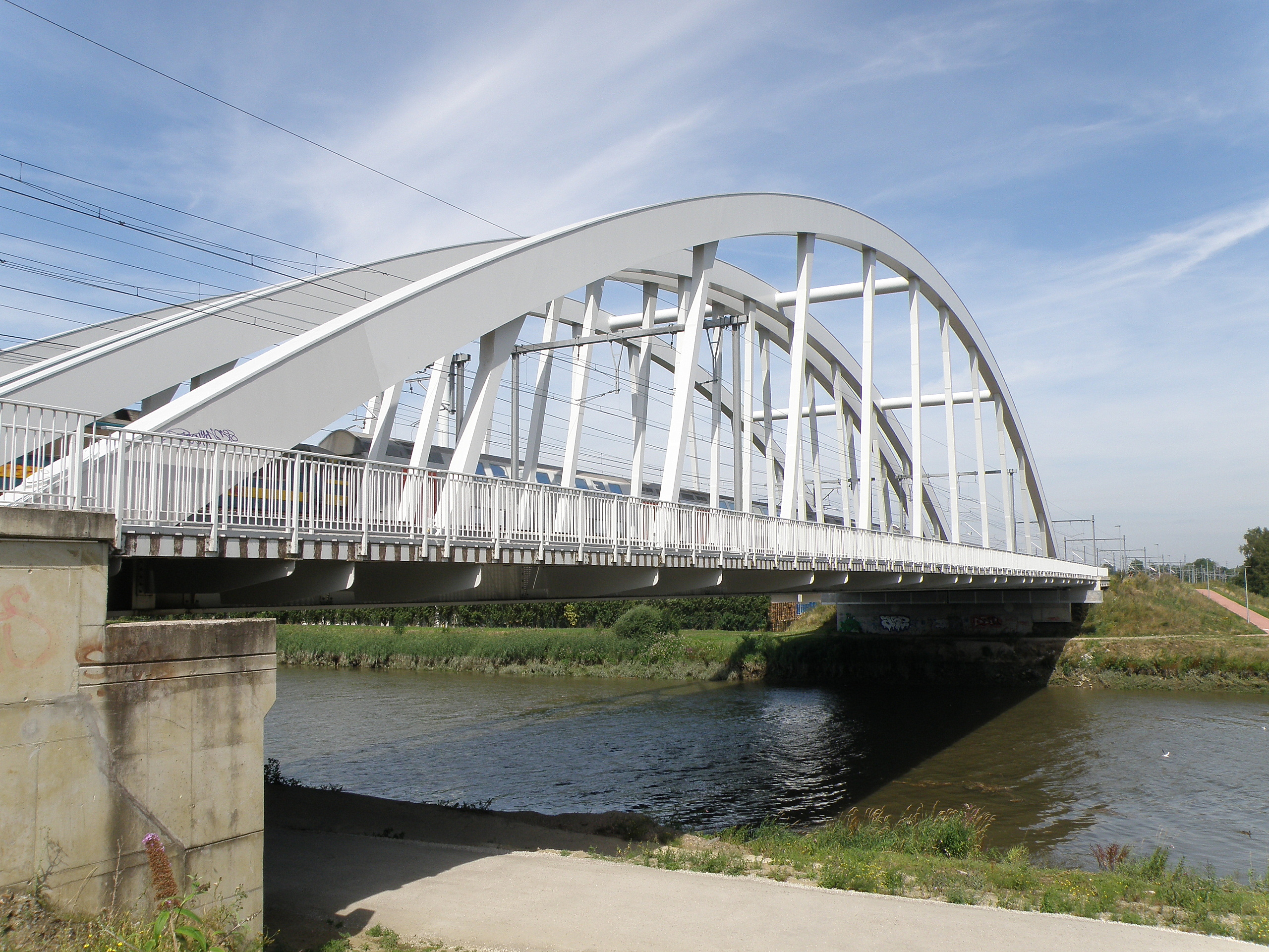 Duffel (prov. Antwerpen, België). Spoorbrug over de Nete (lijn Brussel-Antwerpen).